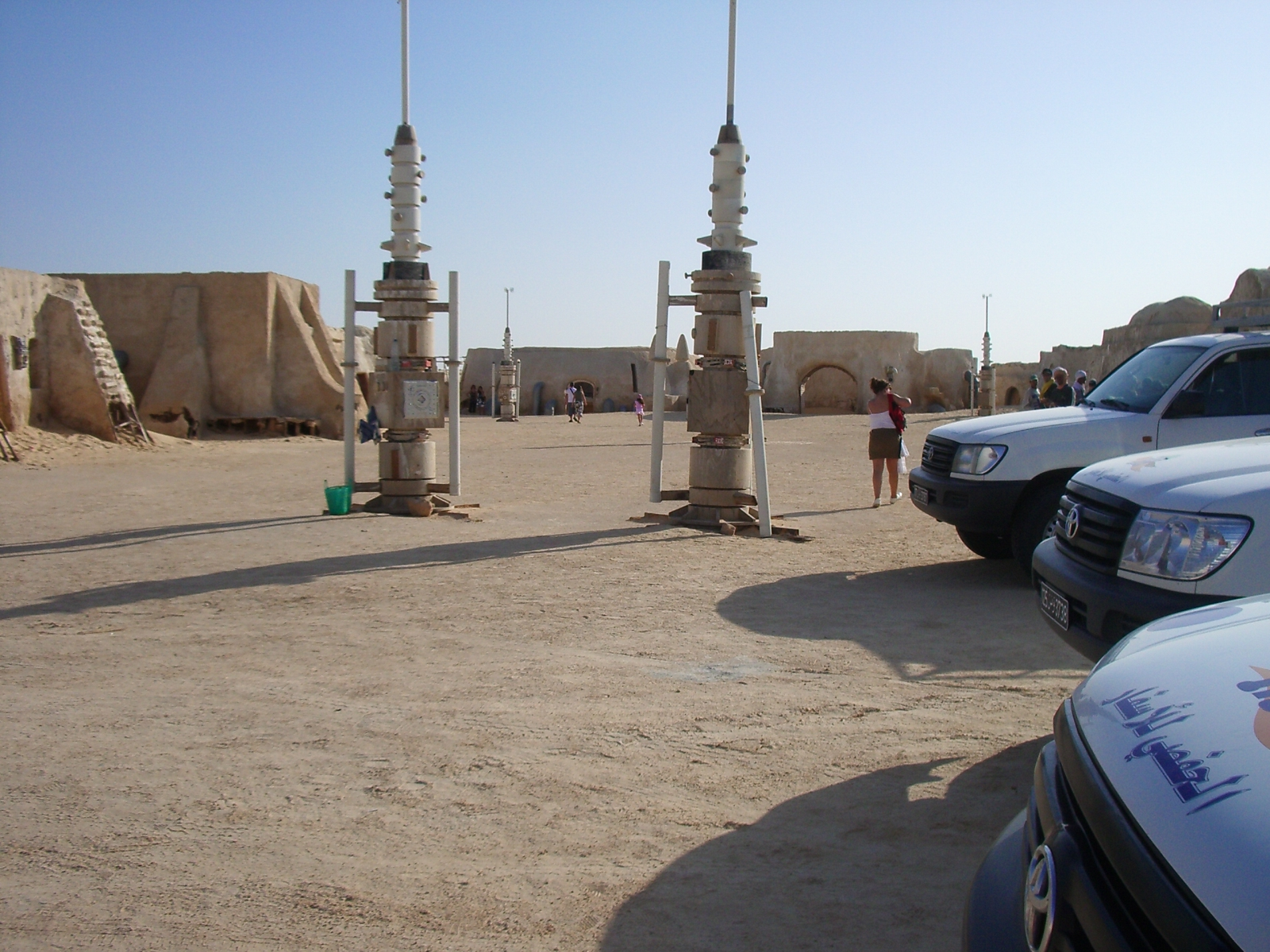 Nefta, decorat de la Guerra de les Galaxies